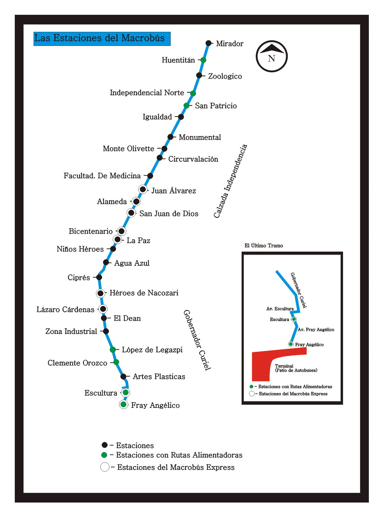 Mapa de las linea 1 Macrobus